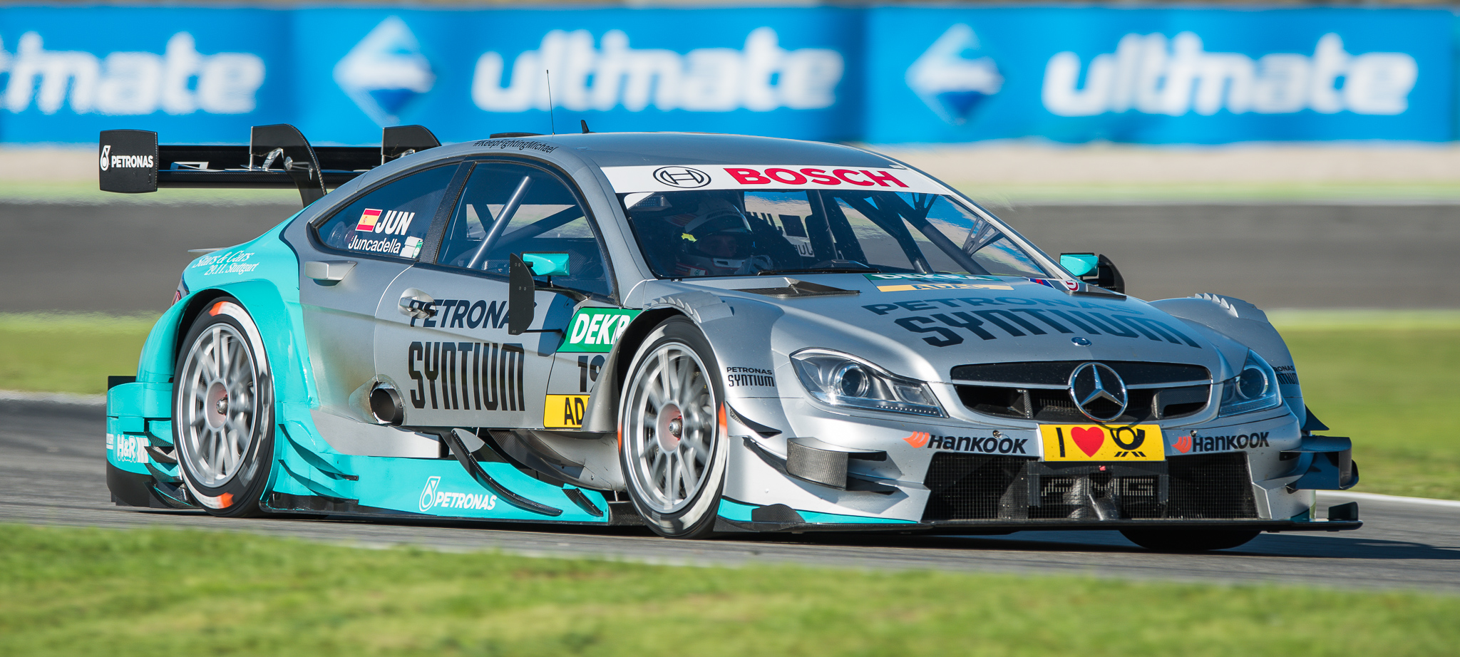 DTM,Daniel Juncadella,Deutsche Tourenwagen Masters,Hockenheimring,Motorsport,Mücke Motorsport,Petronas Mercedes AMG C-Coupe